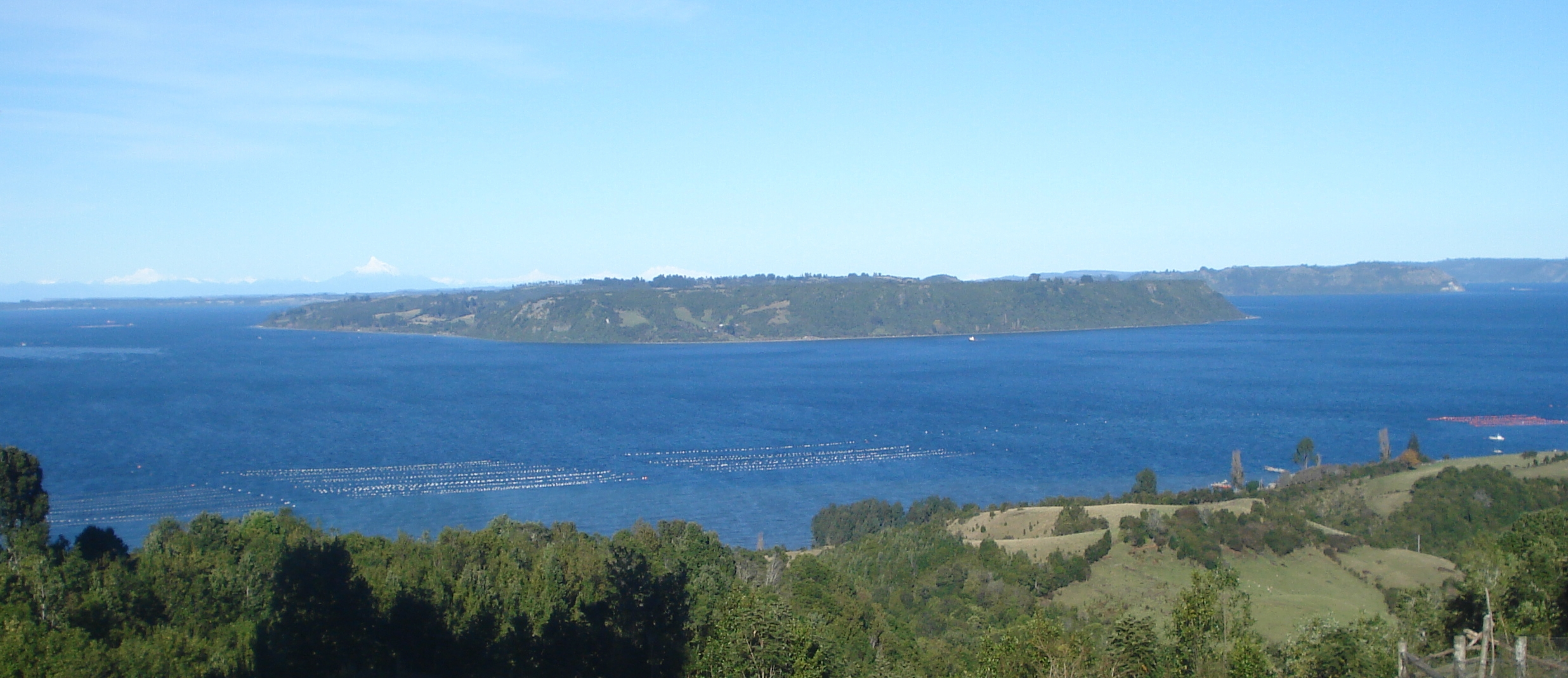 Vista de la isla Linlín y el volcán Corcovado desde Calen, en el archipiélago de Chiloé, Chile.